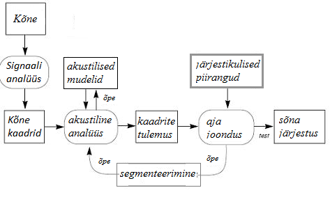 Standard kõnetuvastus mudel.